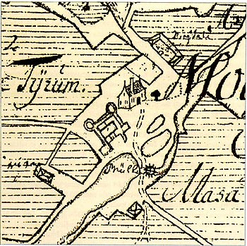 Kaardiväljavõttel on kujutatud Mujani vasallilinnuse põhiplaani, kõrvalasetsevat mõisat, veskit, veskipaisjärve, kalatiike ja lähemat ümbruskonda XVII sajandil. Mujani küla. Kocēni vald, Läti.